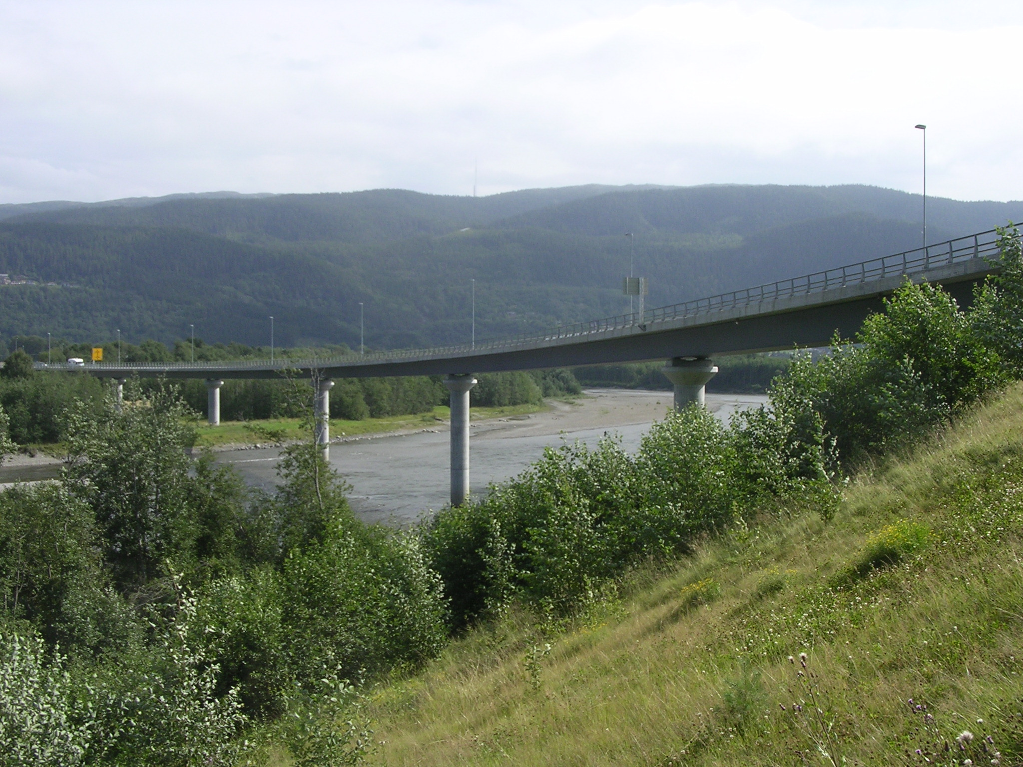 Melhusbrua i Melhus kommune, Sør-Trøndelag